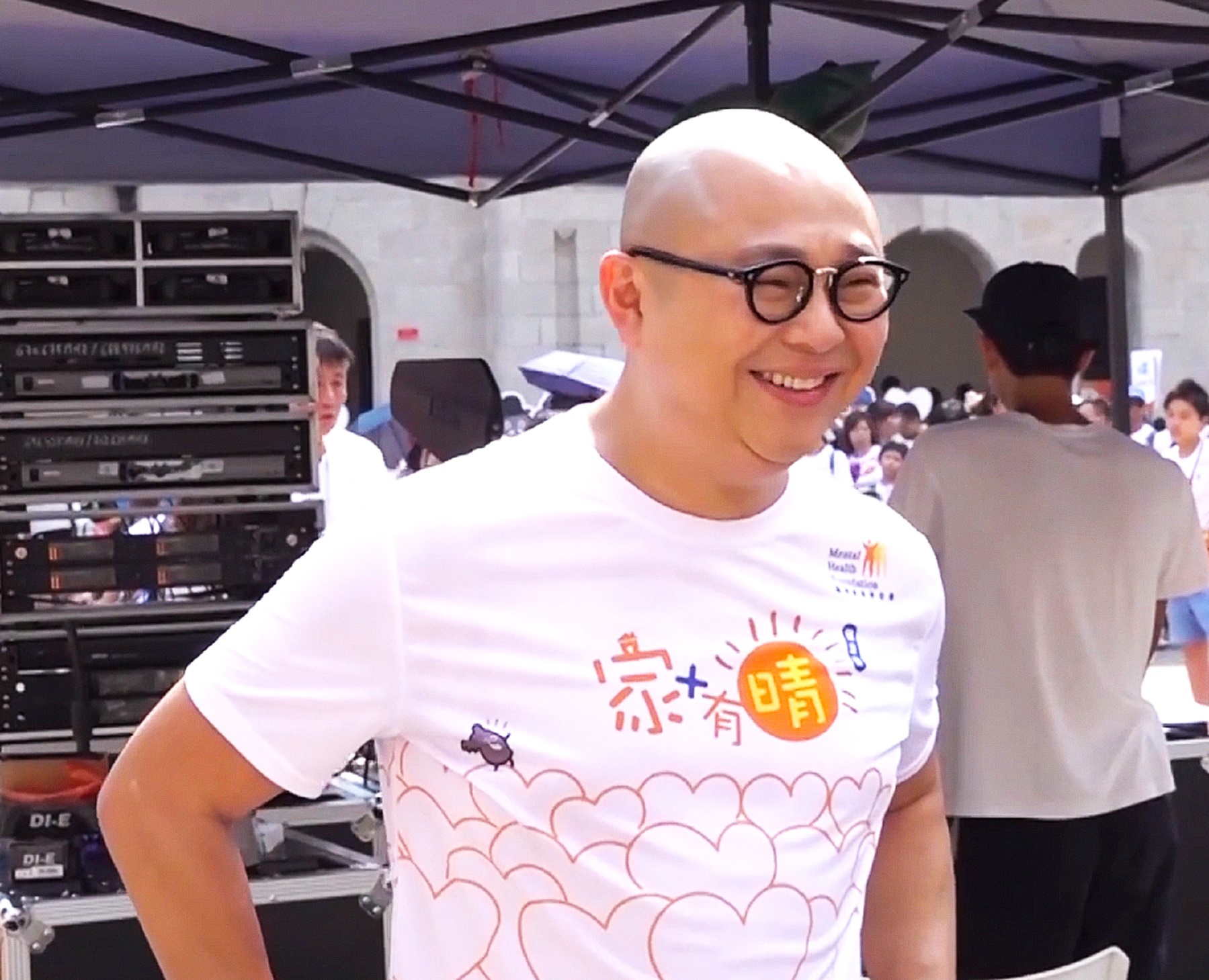 中文（香港）: 精神健康基金會在中環大館舉行的「家＋有晴健康日」活動